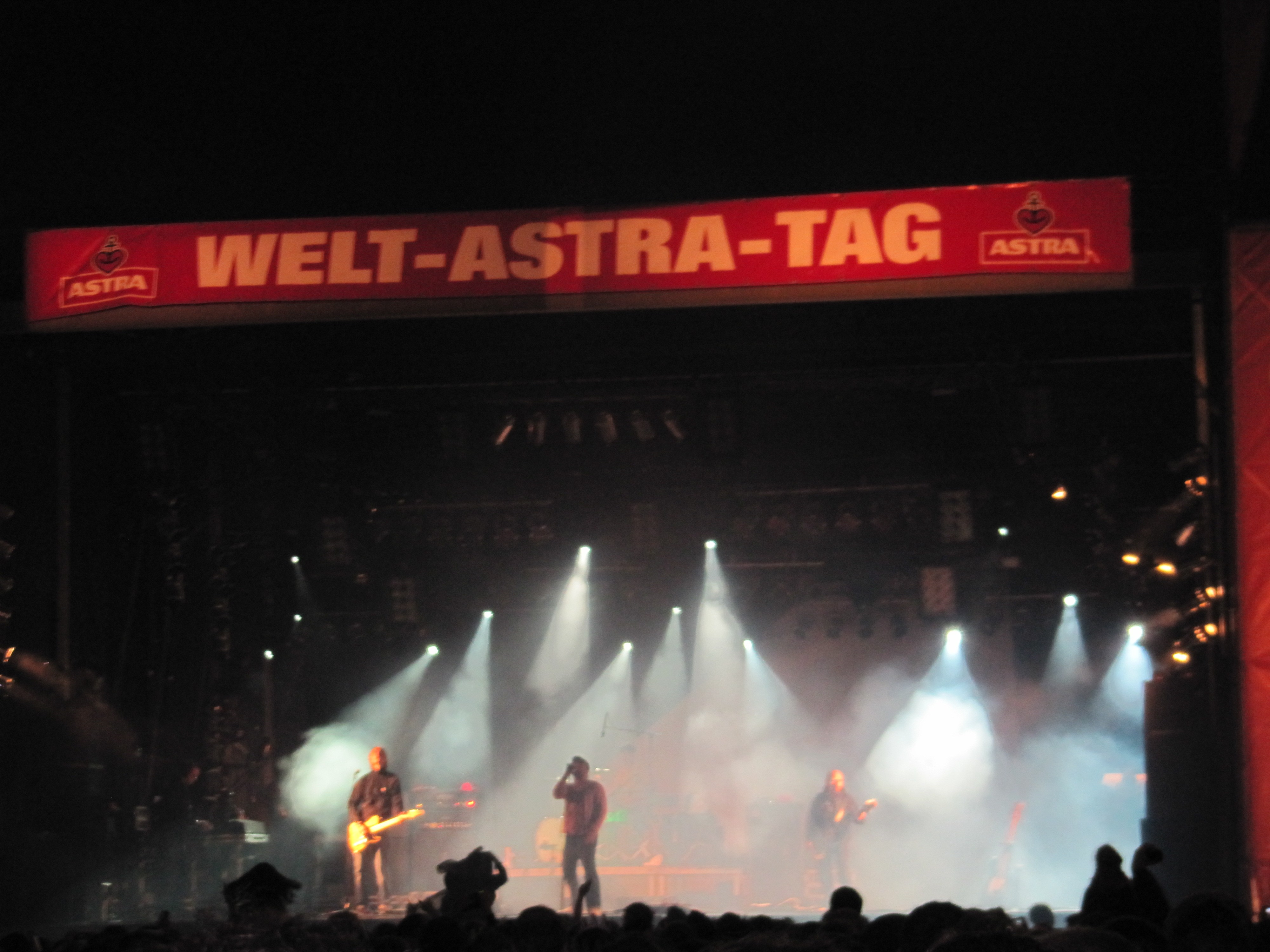 Die H-Bloxs auf dem Welt-Astra-Tag 2010 in Hamburg.